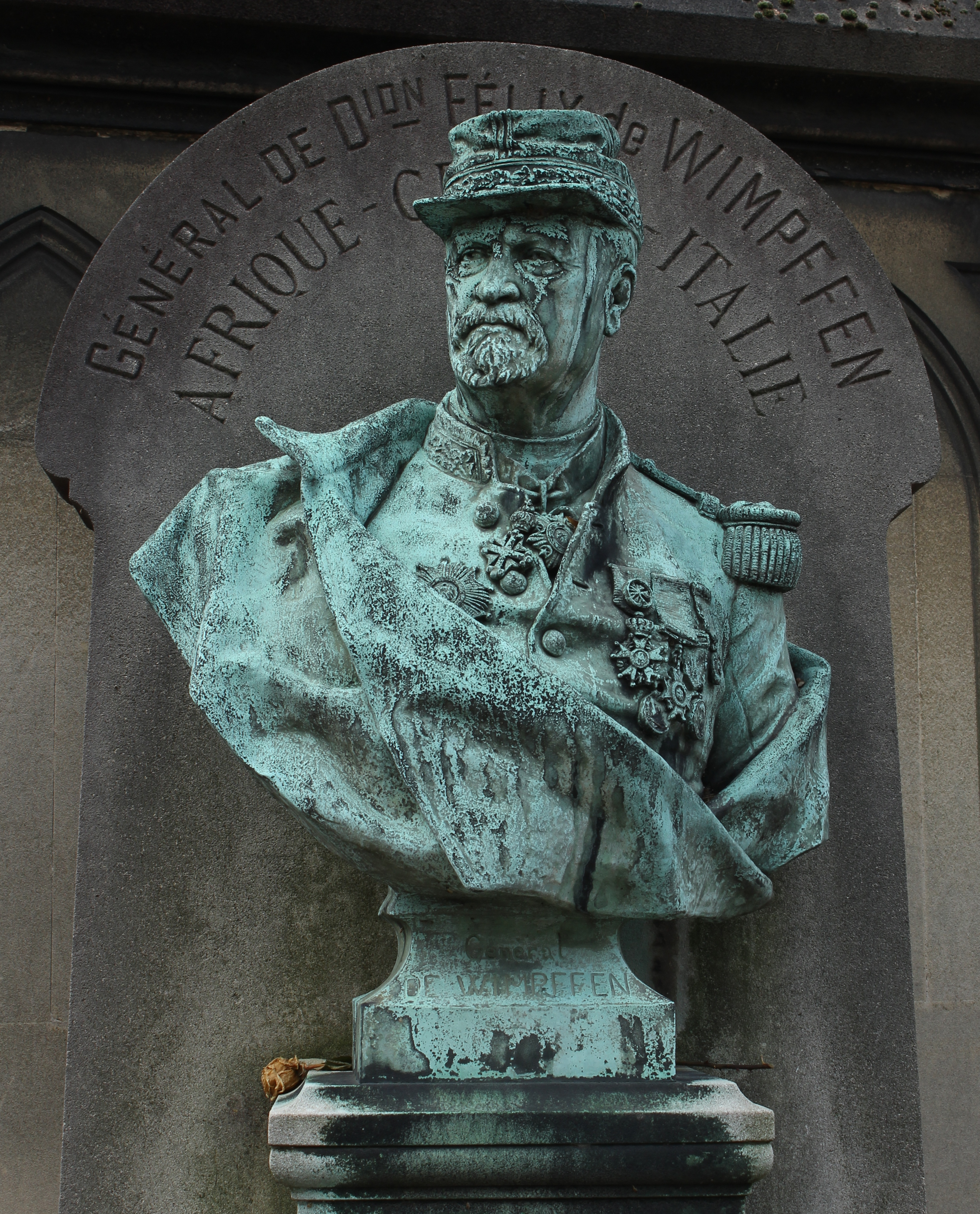 Tombe ornée d'un buste en bronze.buste